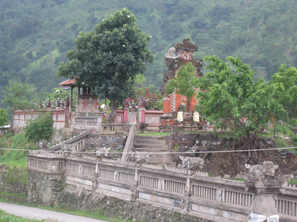 Hindutempel in Dili